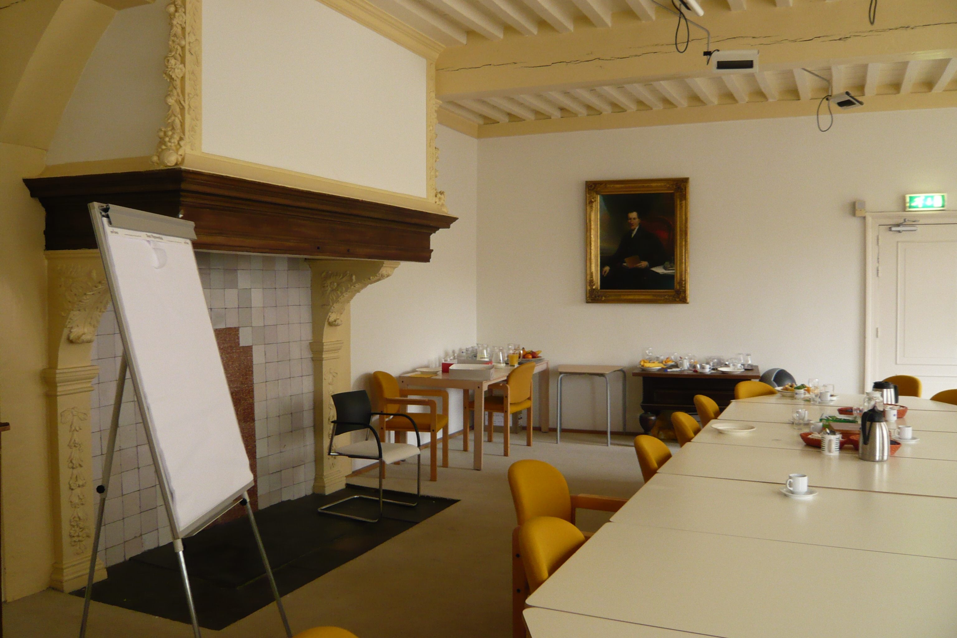 Krijgsraadkamer, or "war-room" in the Haarlem Public Library on the Doelenplein (Gasthuisstraat), Haarlem